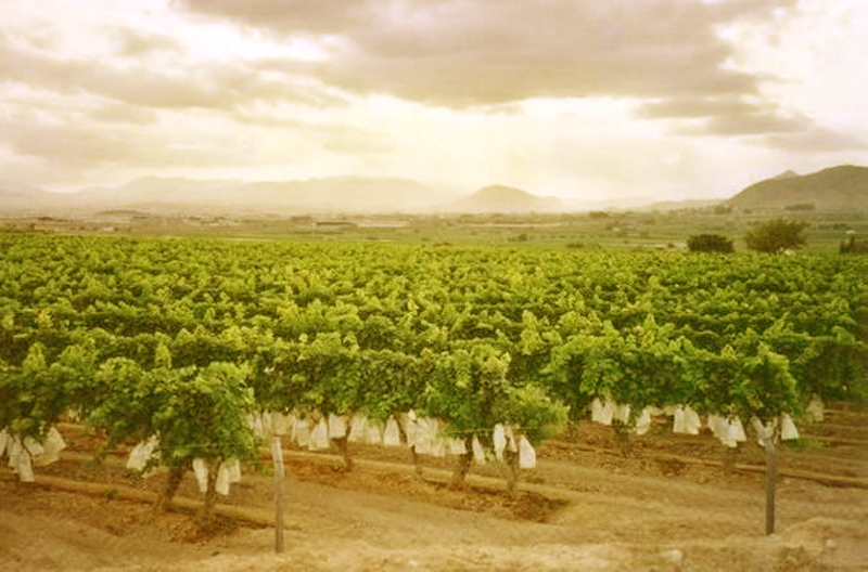 Viñedos en Monforte del Cid